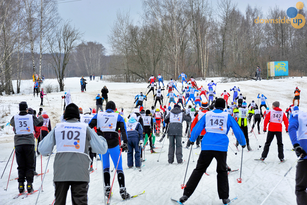 Лыжная гонка СПОРТ ВО БЛАГО